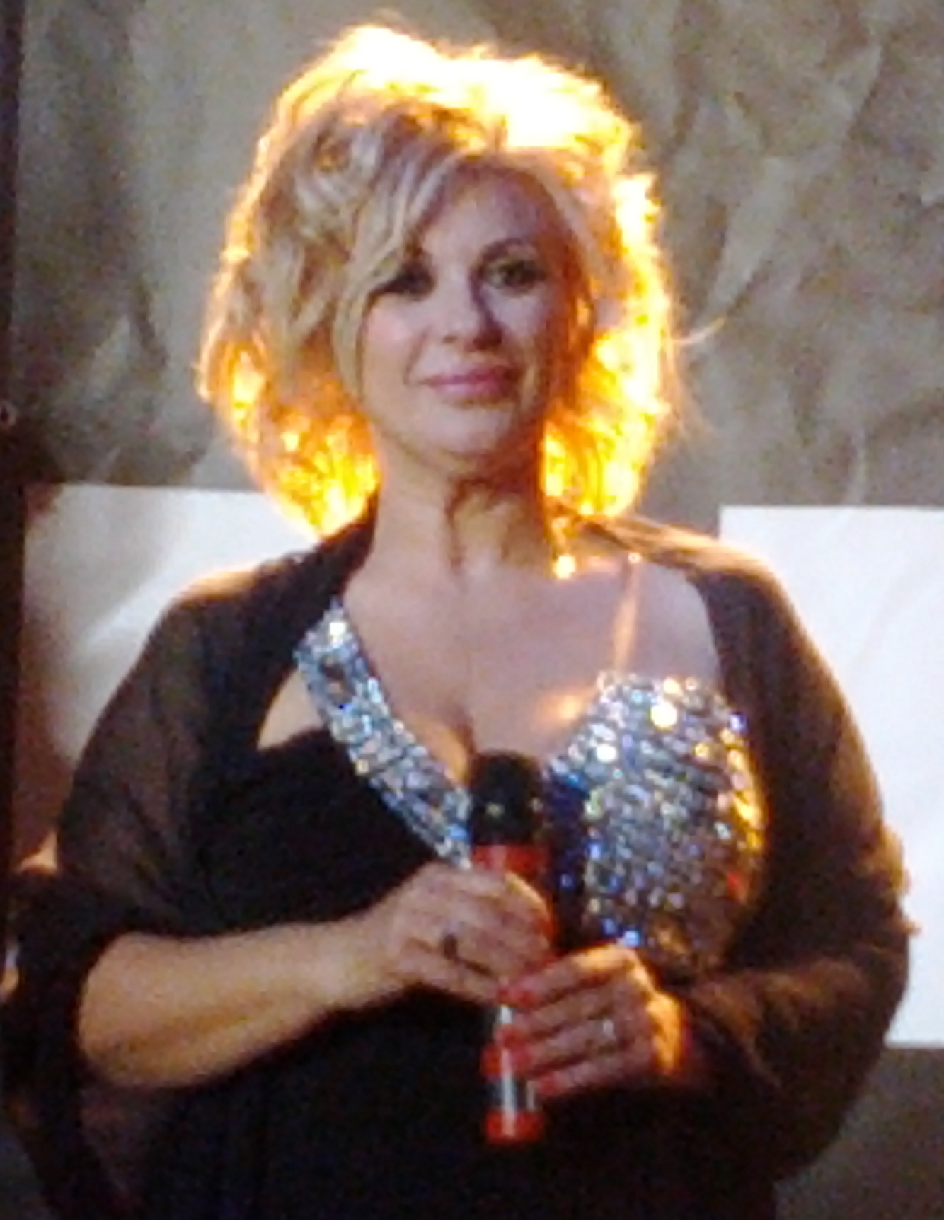 Tina Cipollari, 2012